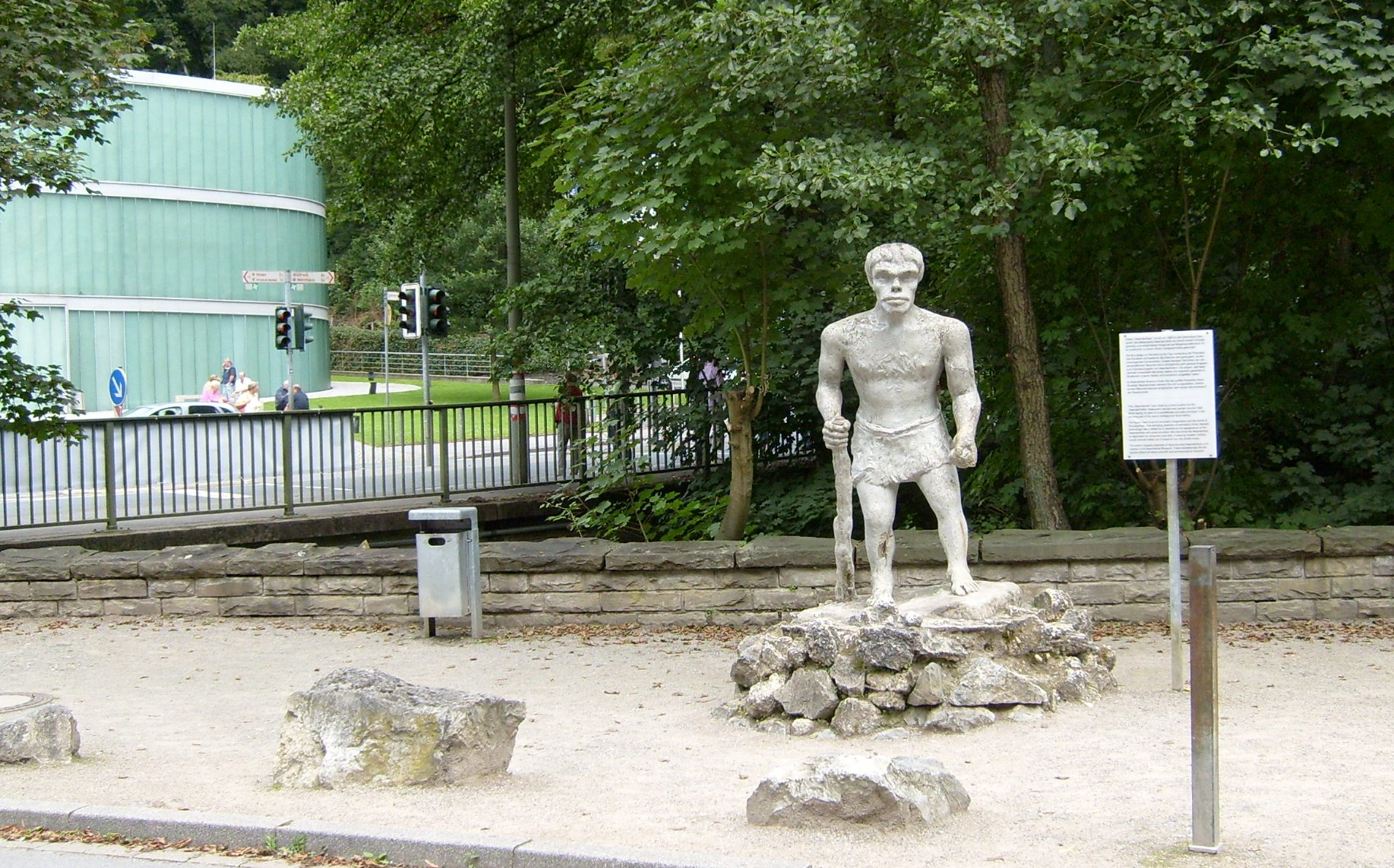 Neandertalerfigur im Neandertal - 1928 auf Veranlassung des Besitzers des Restaurant Neanderhöhle aufgestellte Fantasiefigur des Neandertalers, die nicht der Realität entspricht. Im Hintergrund links: Das neue Neandertal-Museum